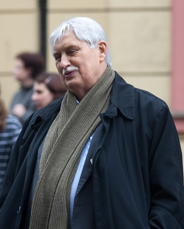 Jiří Dienstbier (1937-2011) v Praze